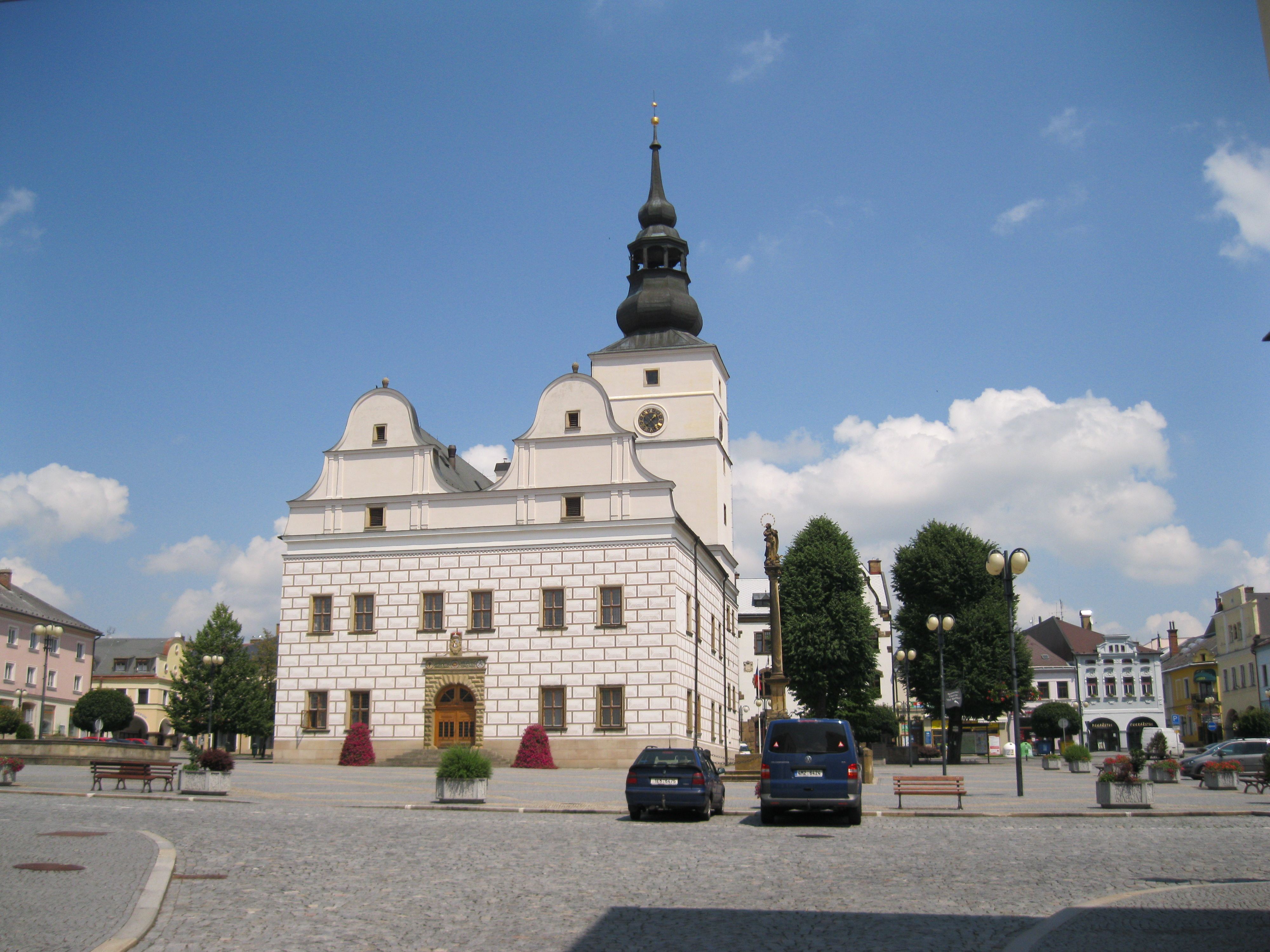 Radnice (Lanškroun)